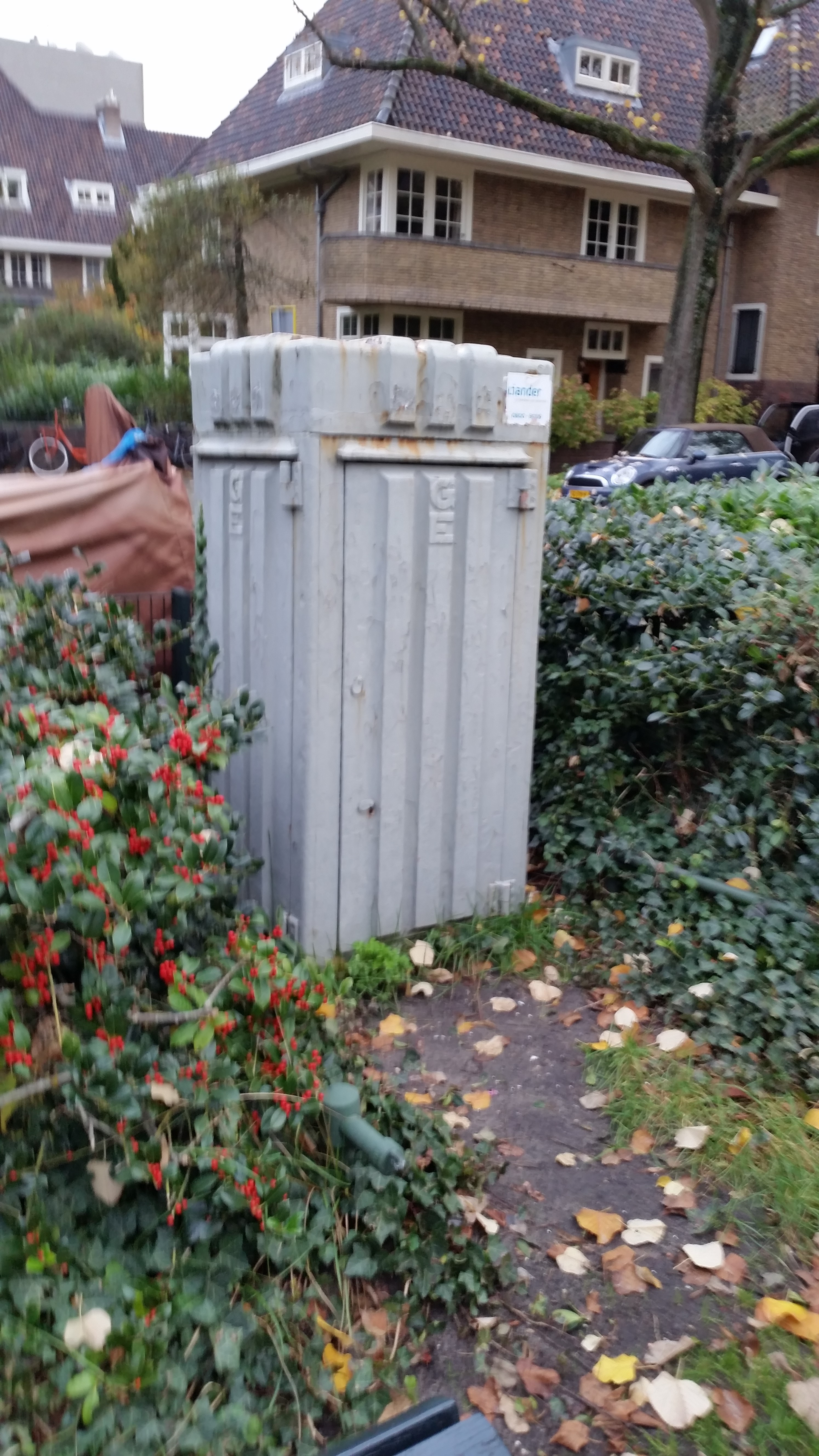 Veroneseplantsoen, Amsterdam; elektriciteitskast van Pieter Lucas Marnette